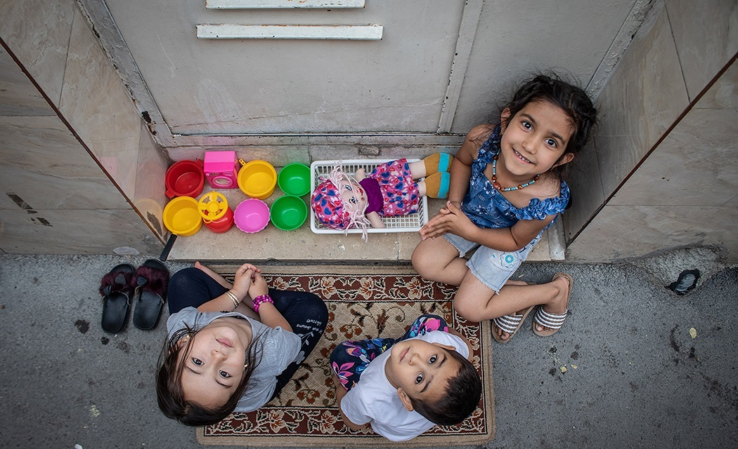 چند کودک در حال بازی کودکانه